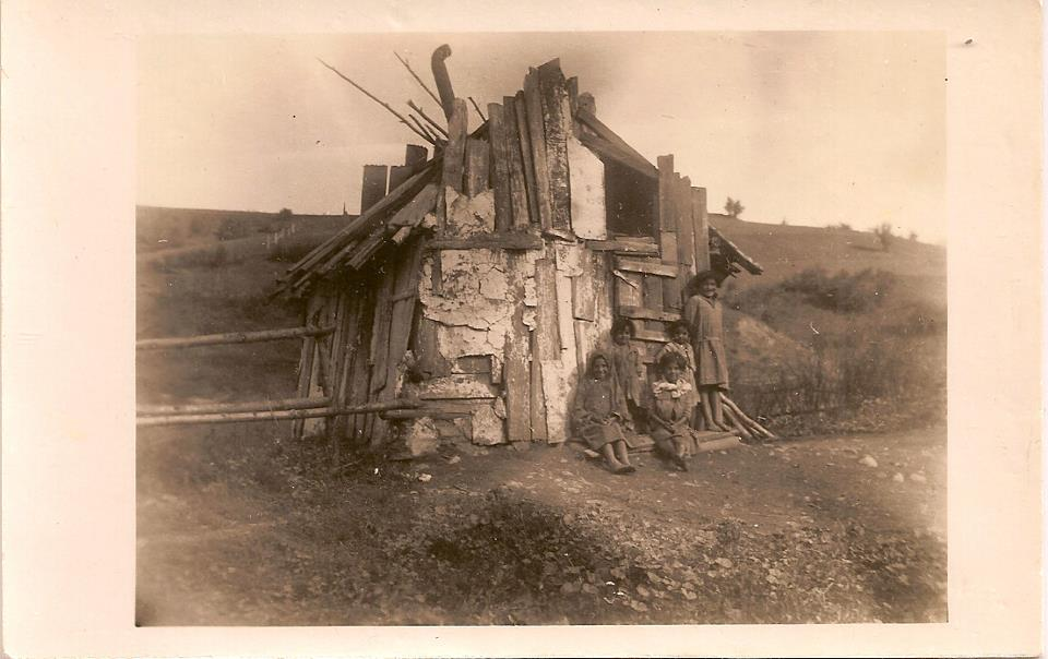 Cigánska koliba, pravdepodobne na území Slovenska, zo začiatku 20. storočia